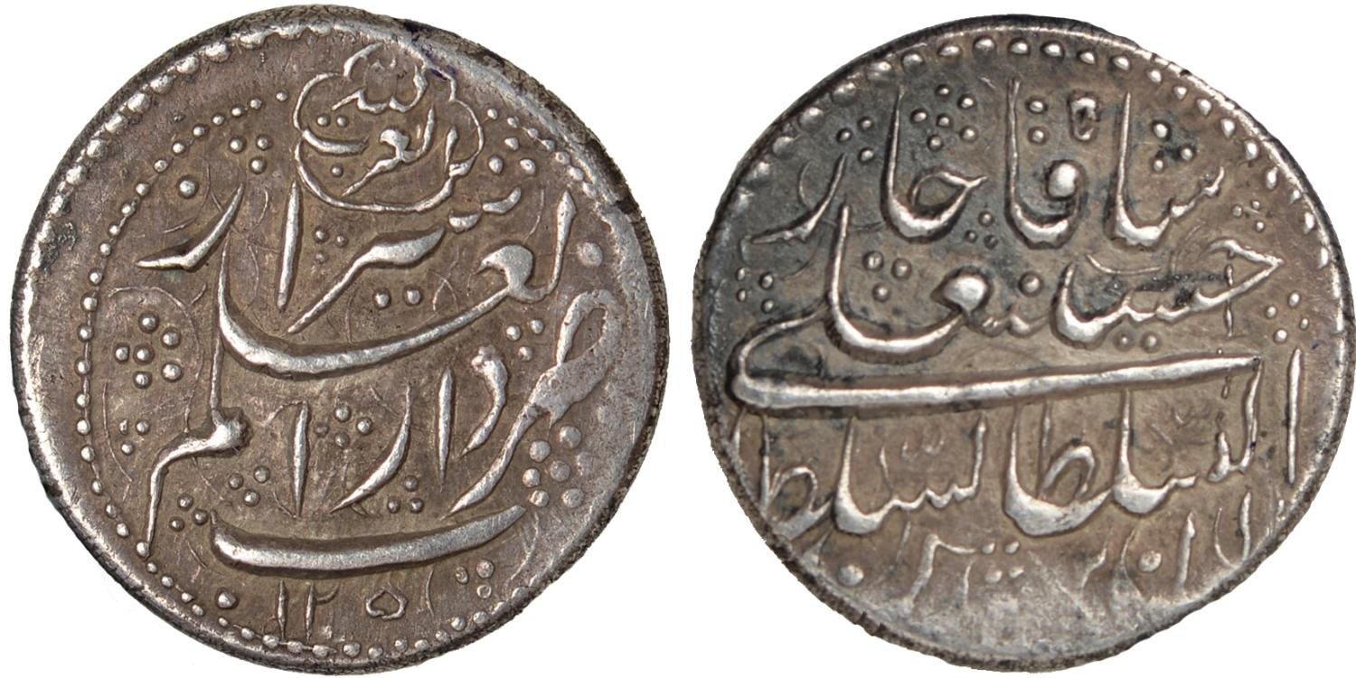 سکه نیم قران حسینعلی میرزا